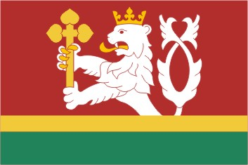 Kocbeře